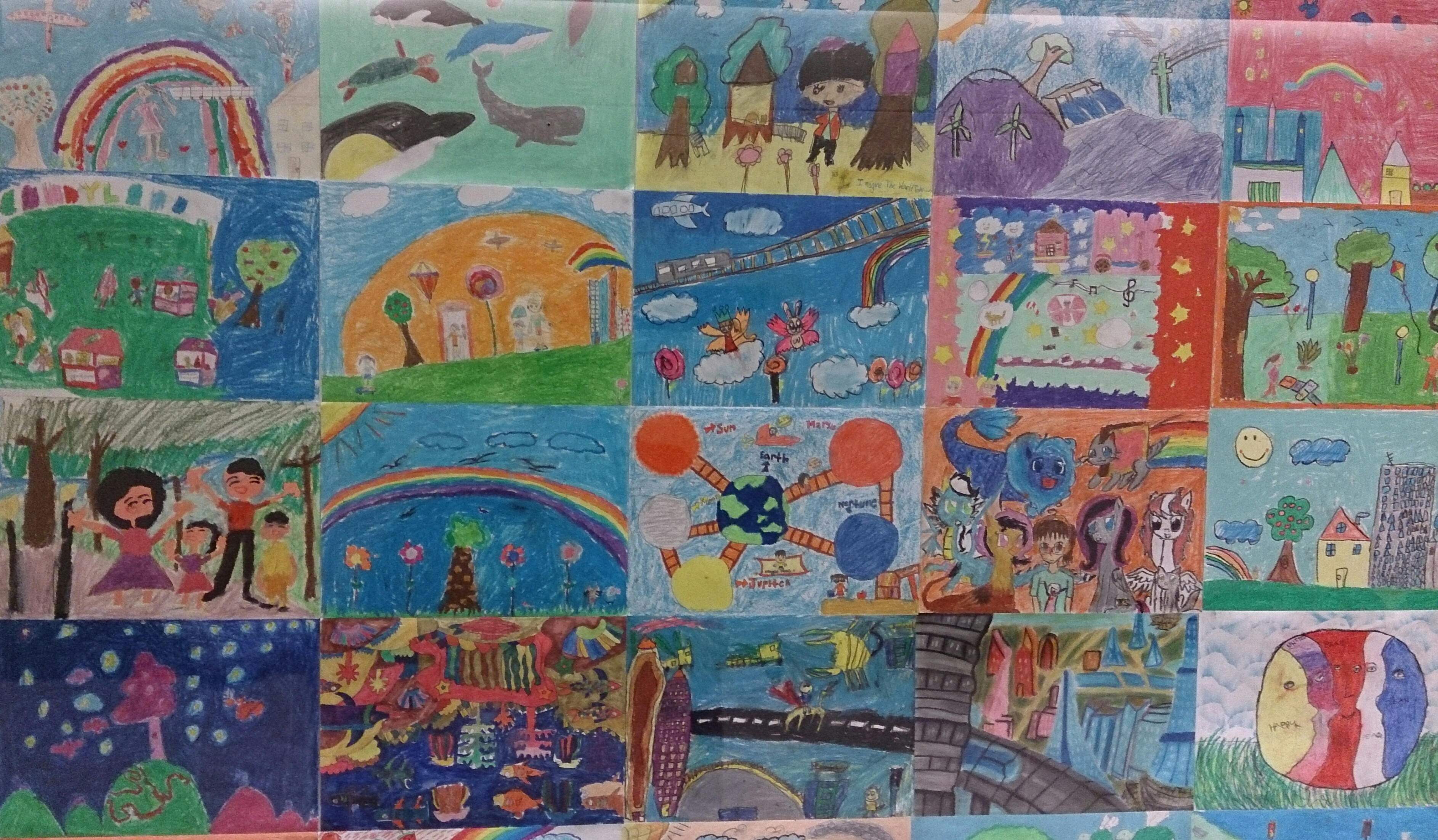 drawings by kids